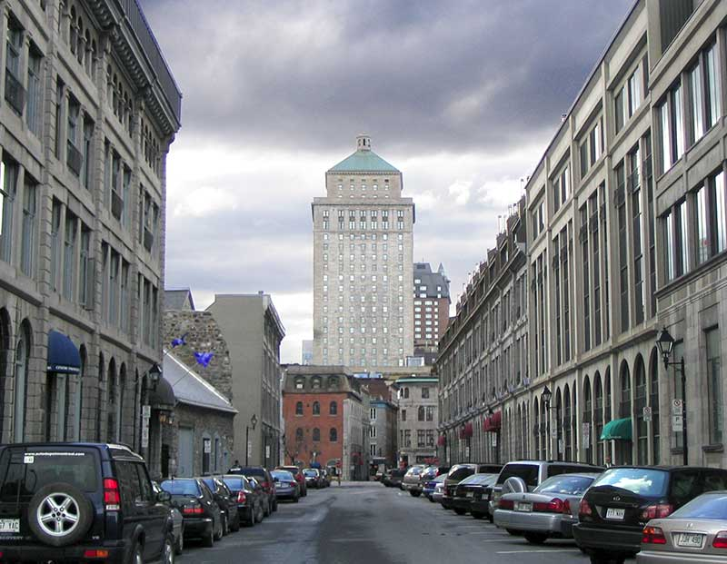 Tour de la Banque Royale, vue de la rue Saint-Pierre, Montreal, Canada